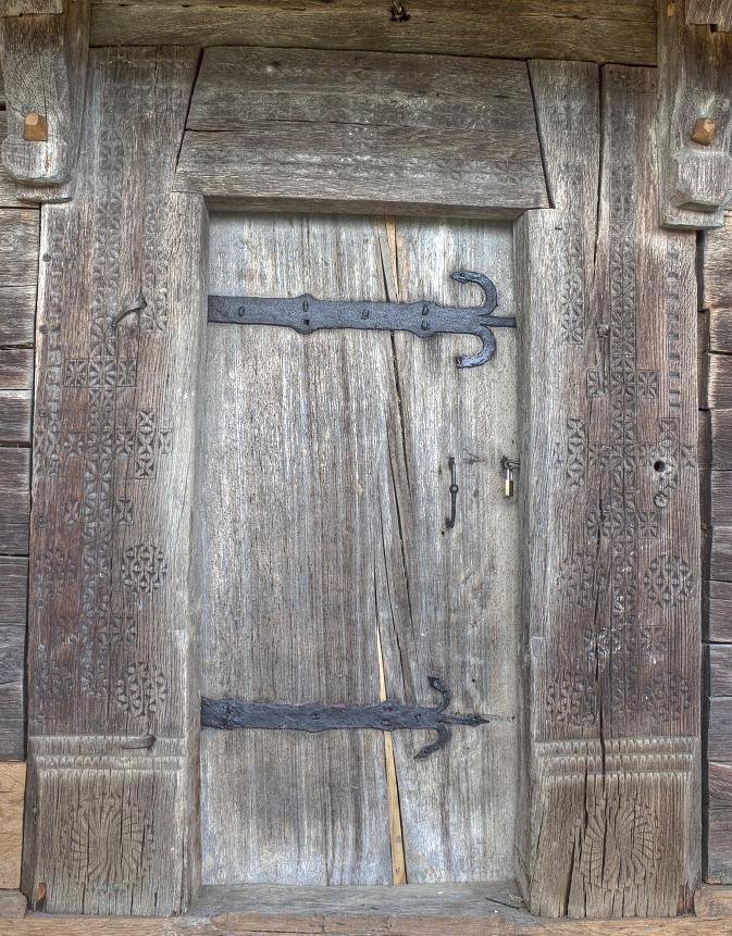 Biserica de lemn din Măgura, judeţul Sălaj - plan.